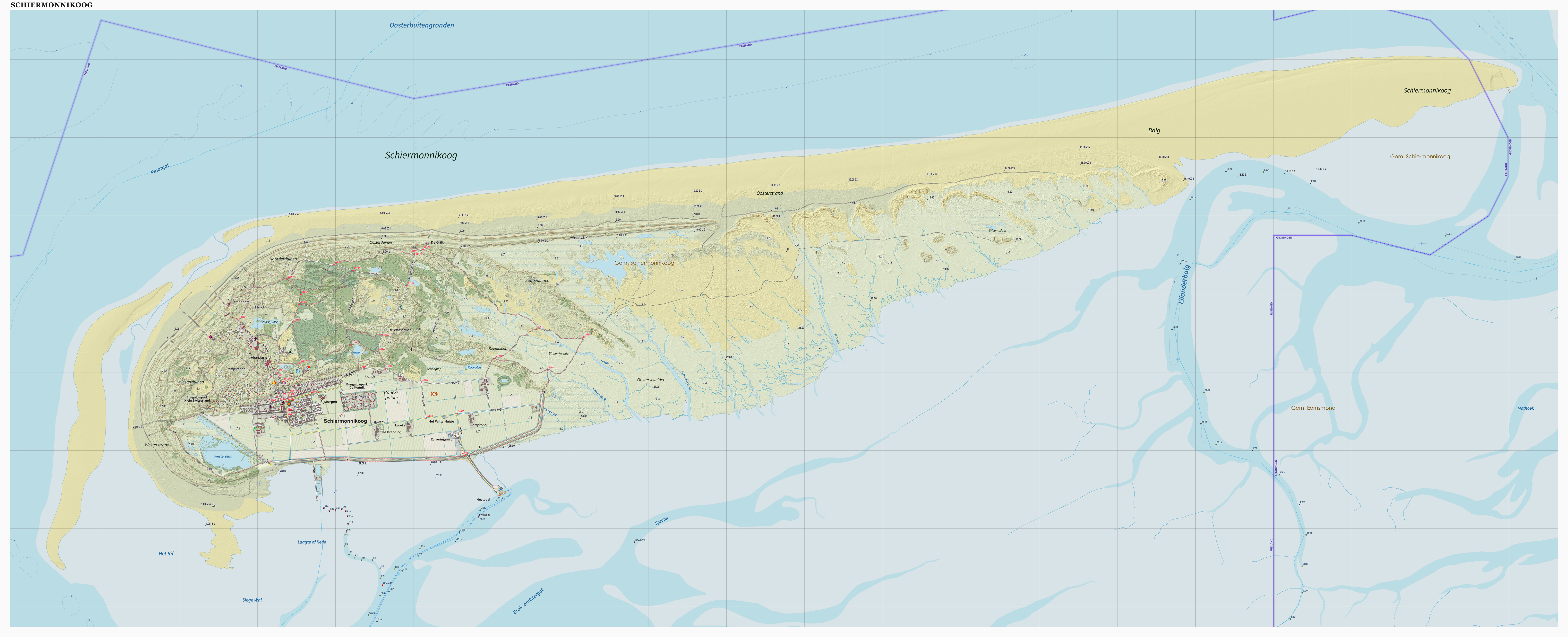 Topografische kaart van Schiermonnikoog (natuurgebied). Resolutie: 400 pixels/km. Samengesteld door Jan-Willem van Aalst op basis van de GML open geodata van de BRT/Top10NL (basisregistratie Topografie, Kadaster), vrijgegeven door Kadaster onder de Creative Commons BY licentie. Additionele gegevens uit BAG uit de Open Street Map en uit de Risicokaart. Zie ook de Legenda.